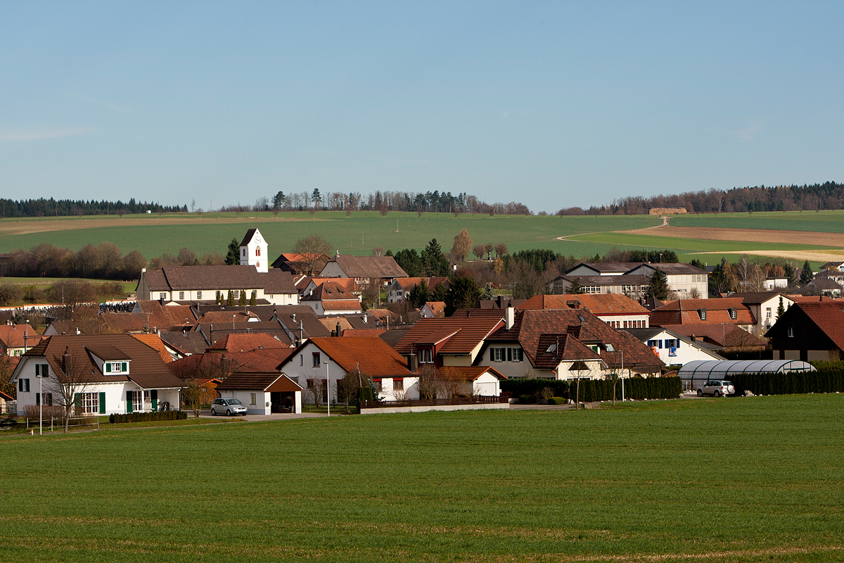 Alle (JU)